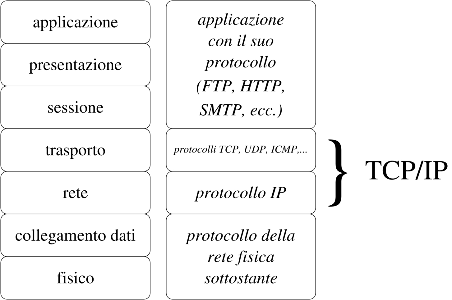 Figura 32.16. Abbinamento tra il modello ISO-OSI e la semplicità dei protocolli TCP/IP.